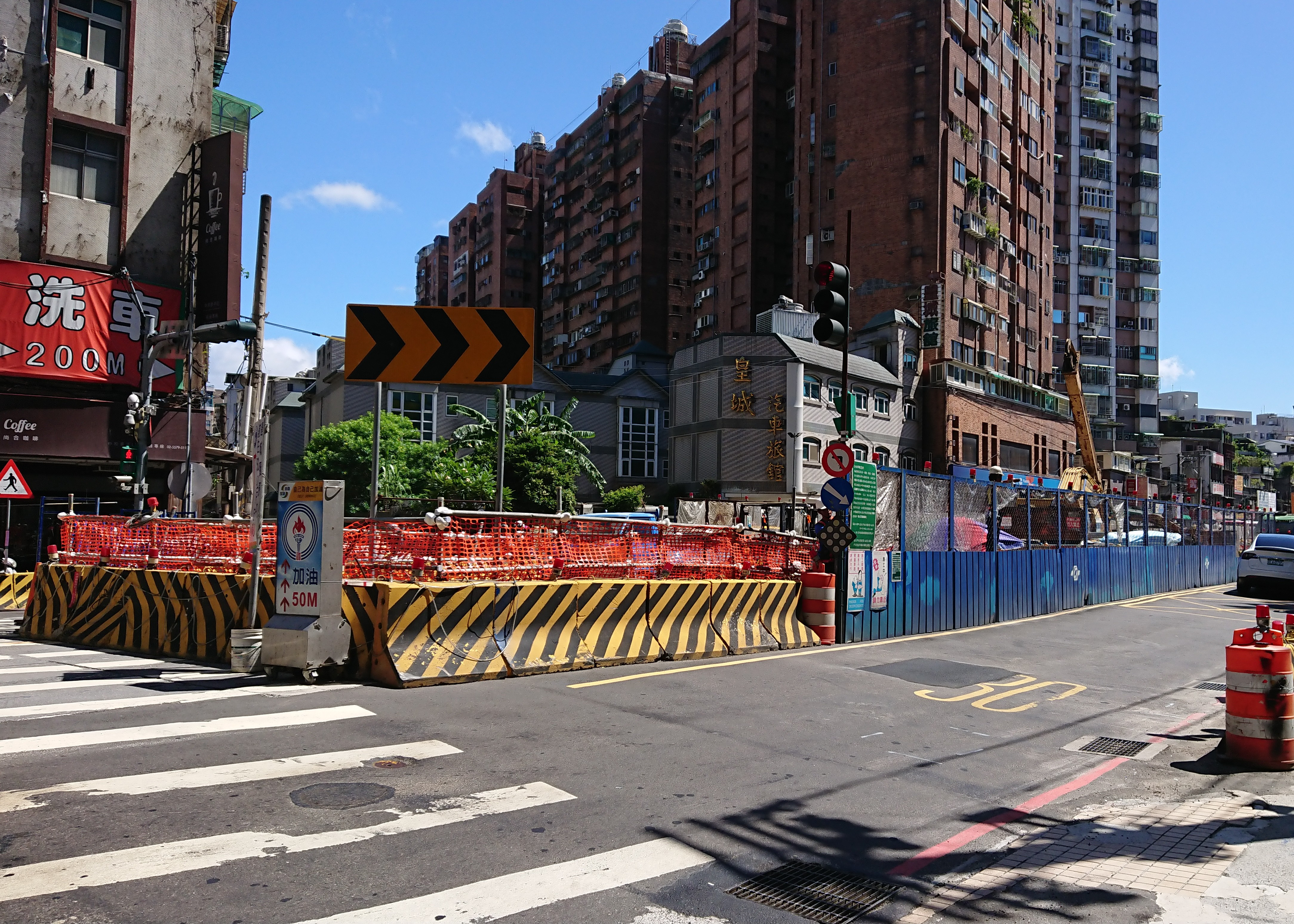 新北市中和區連城路，台北捷運萬大樹林線中和站工地。